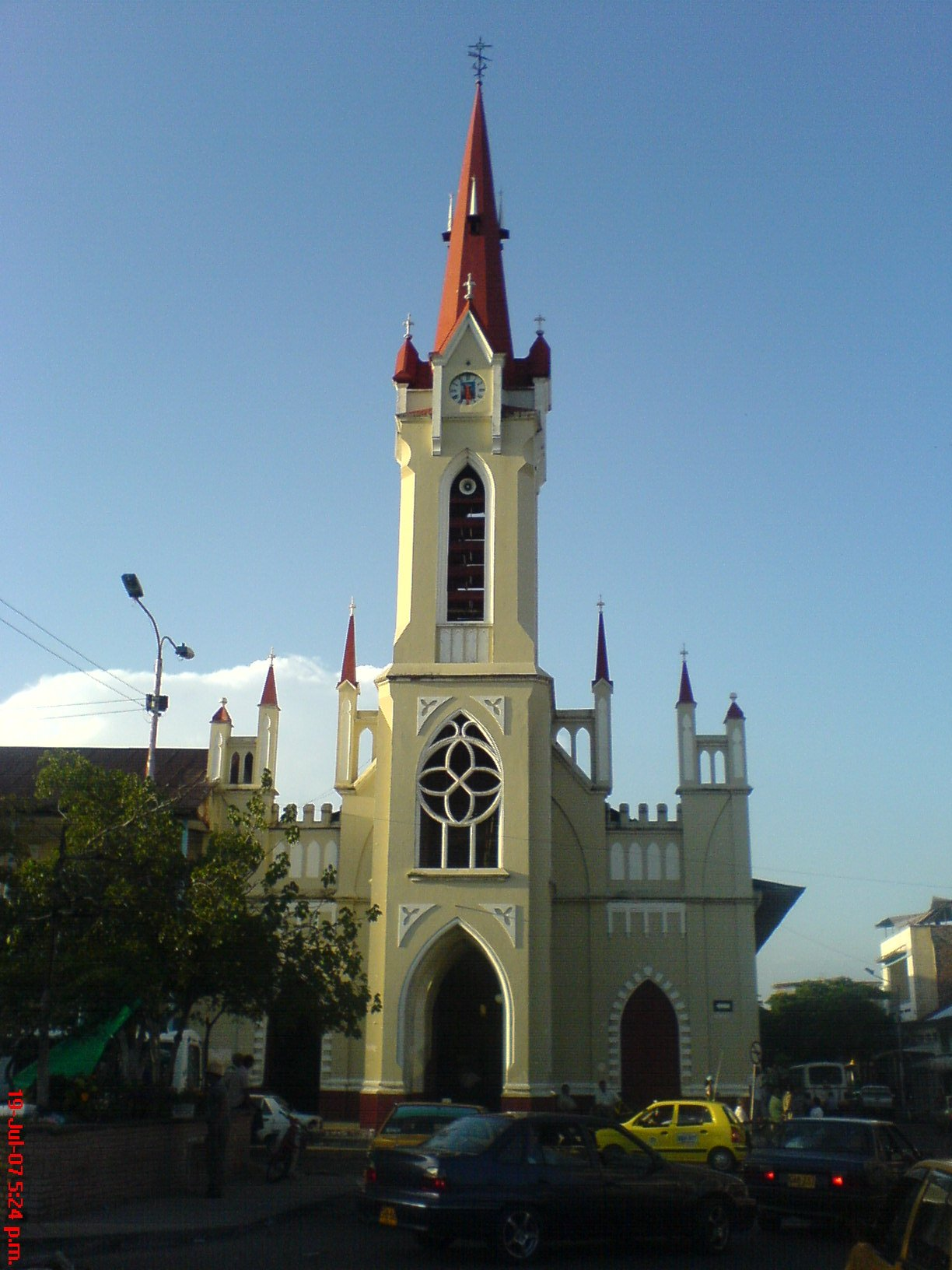 Iglesia Católica Girardót Colombia